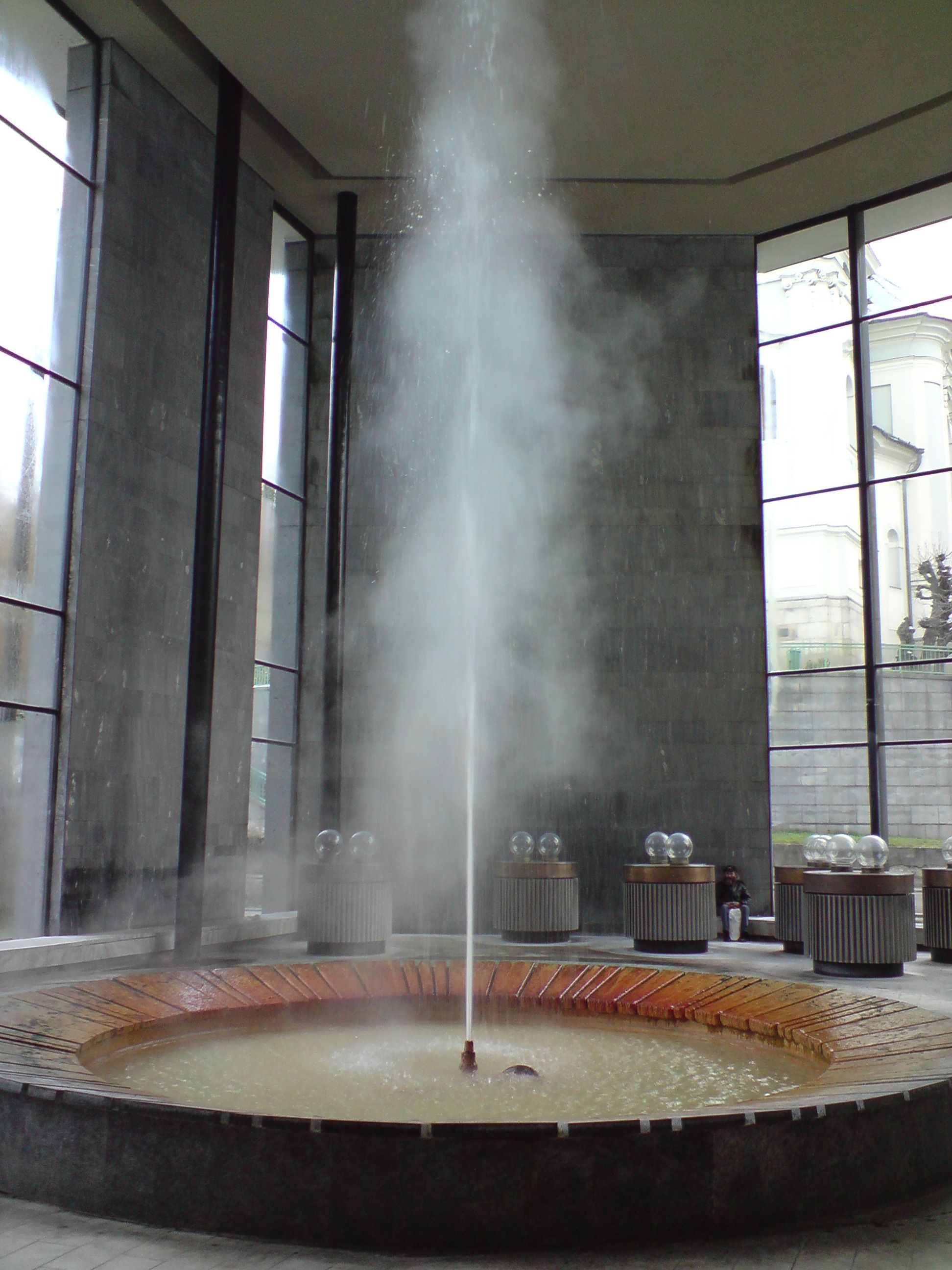 Karlovy Vary - vřídlo